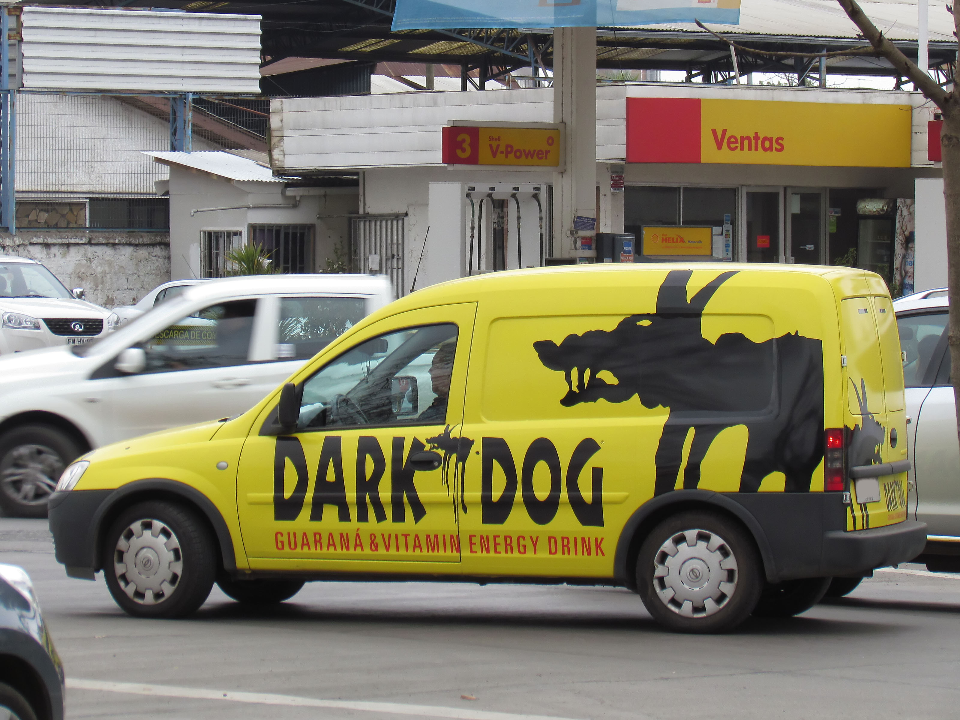 Chevrolet Combo CDTi dark dog 2011